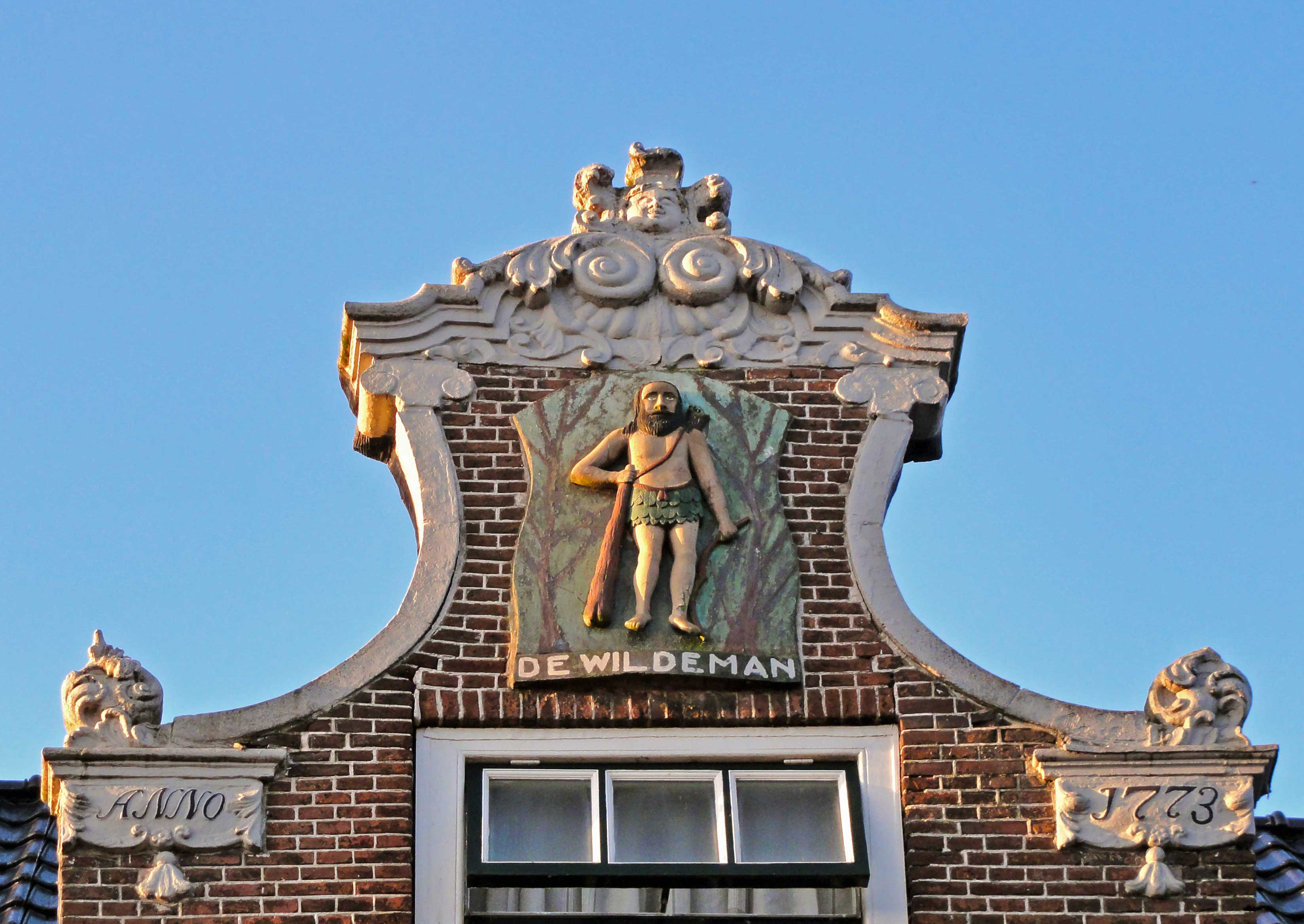 "De Wildeman", reliëf in Lemmer